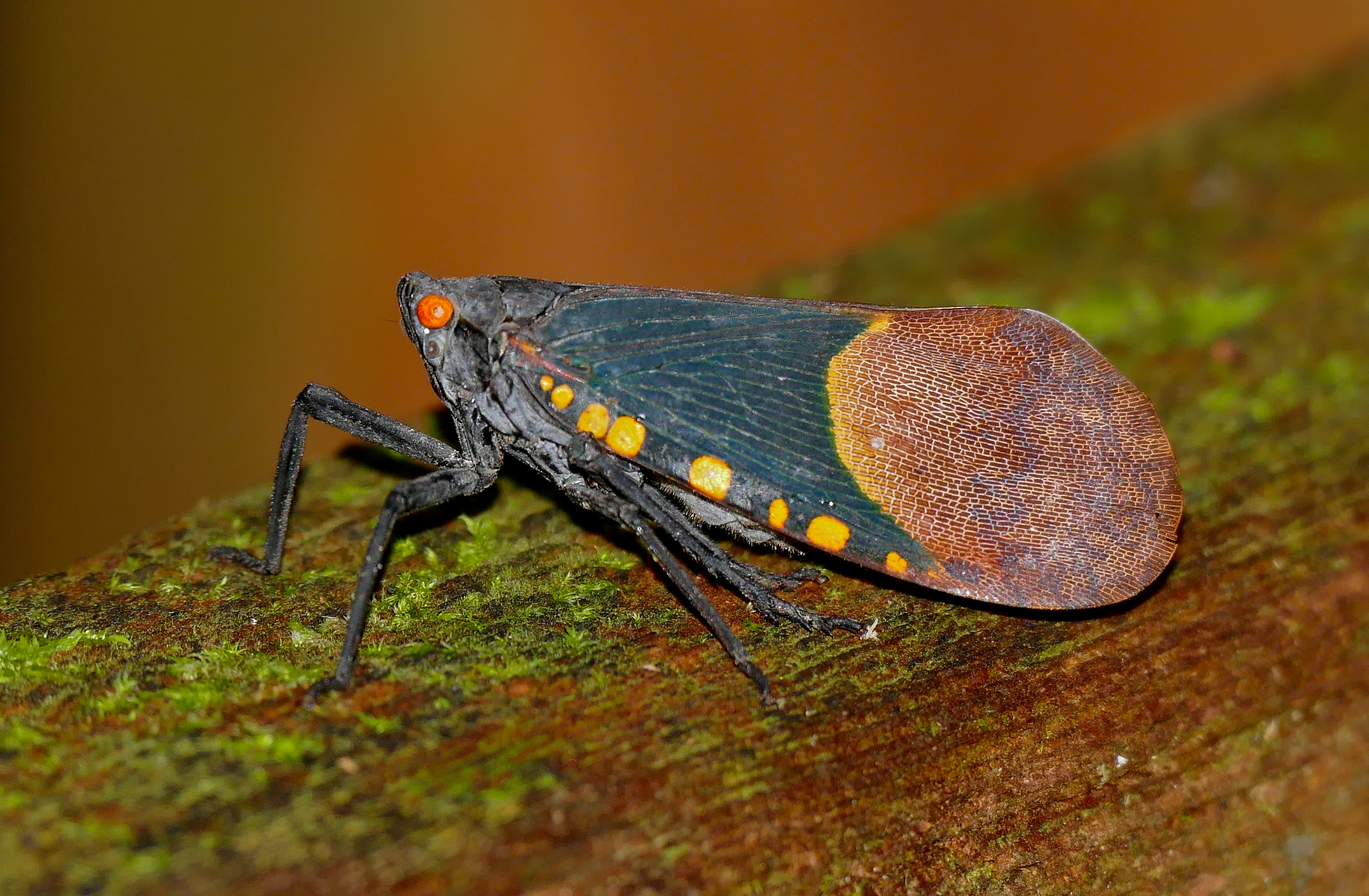 Mulu NP, Sarawak, MALAYSIA